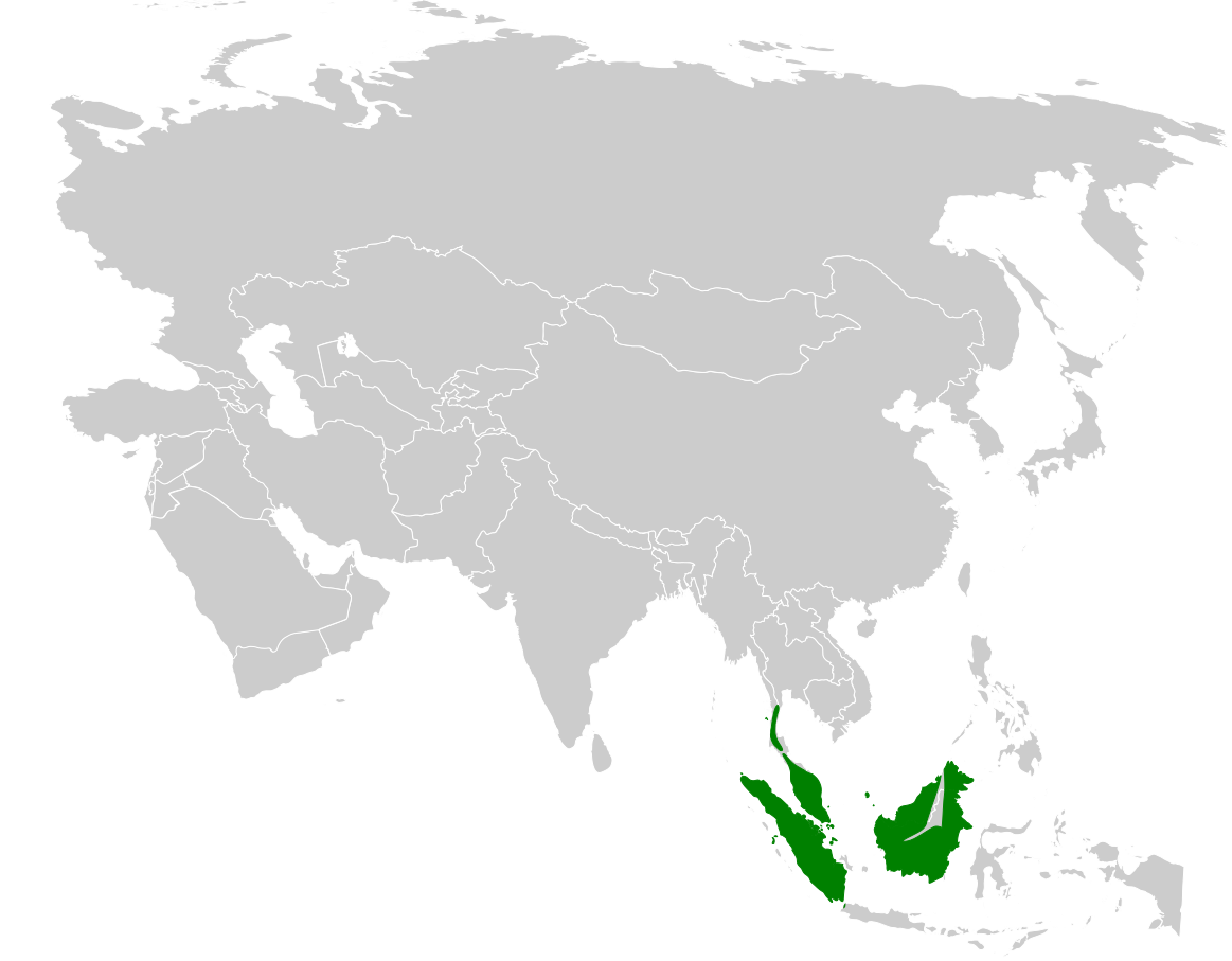 Tricholestes criniger distribution map, based on